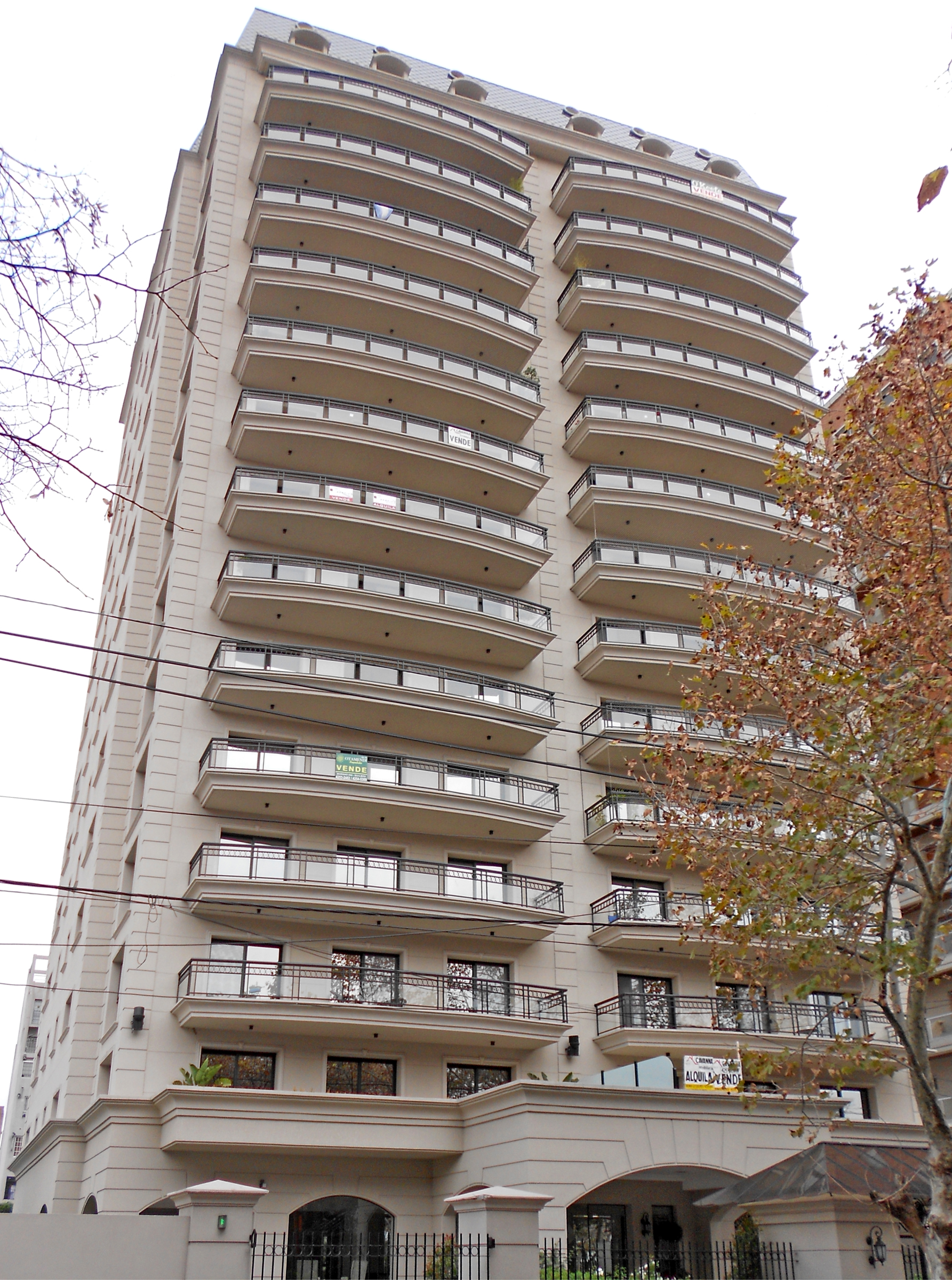 Torre Colón Palace, en la ciudad de Quilmes